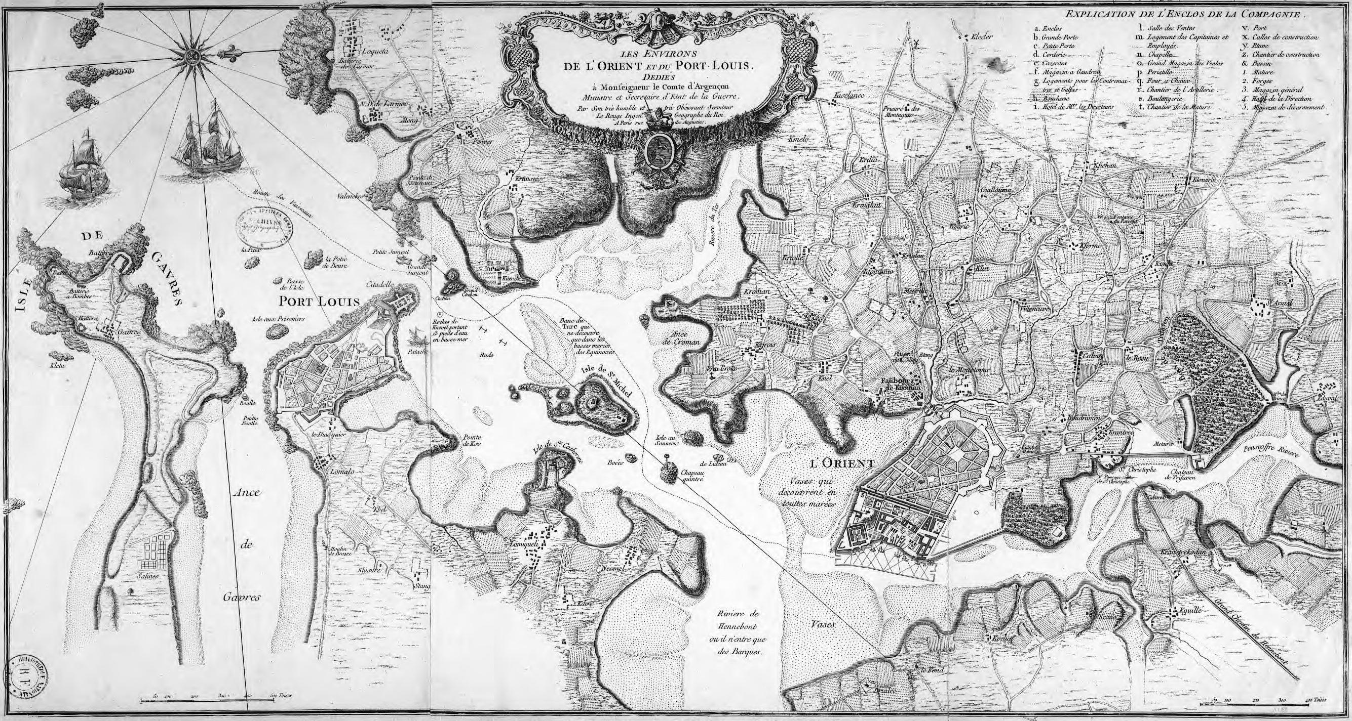 Carte de Lorient et de sa rade réalisée en 1750 par Georges-Louis Le Rouge pour le Ministre et Secrétaire d’État de la Guerre